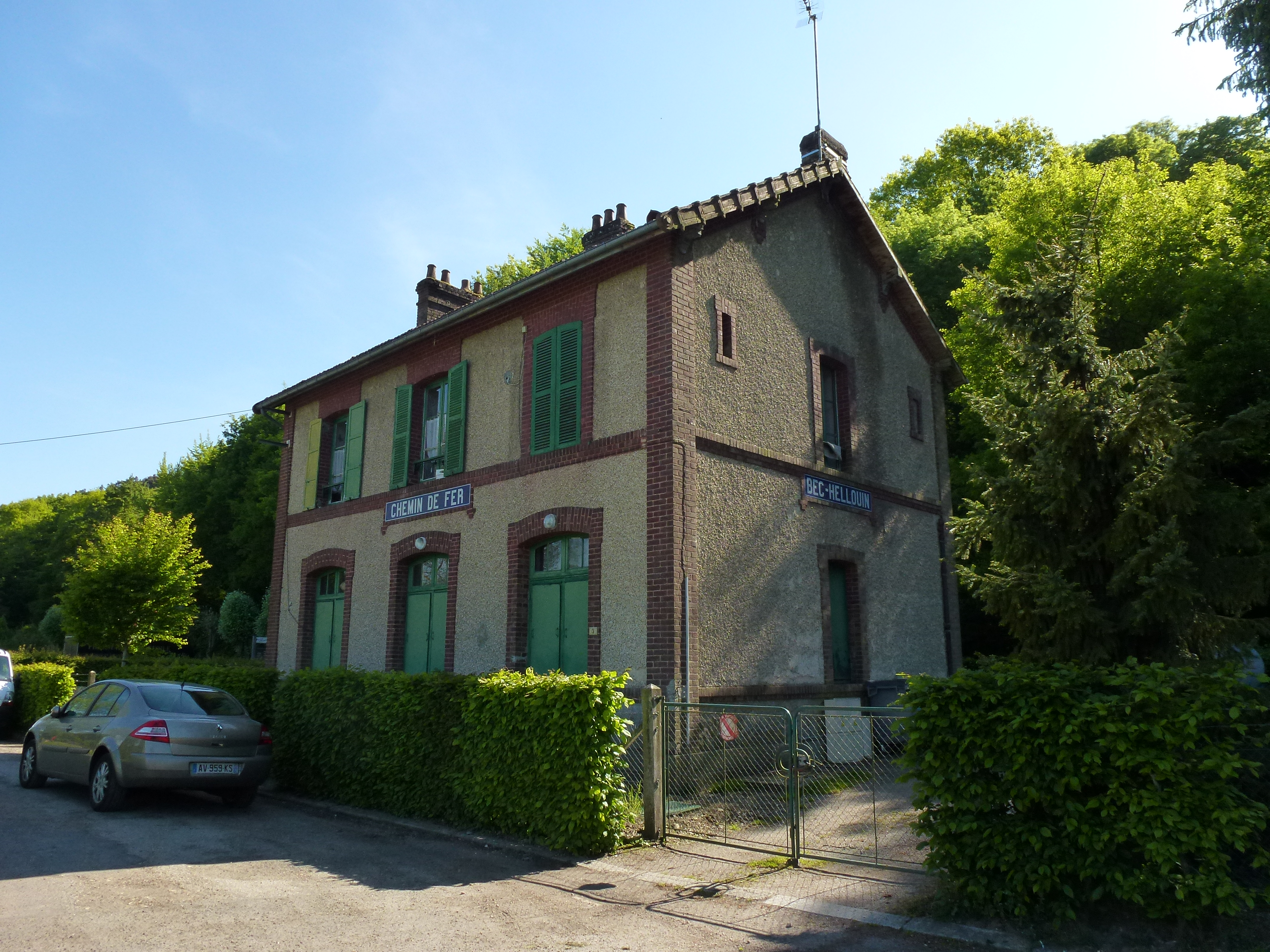 Voie verte Évreux-Vallée du Bec 11, ancienne gare du Bec-Hellouin